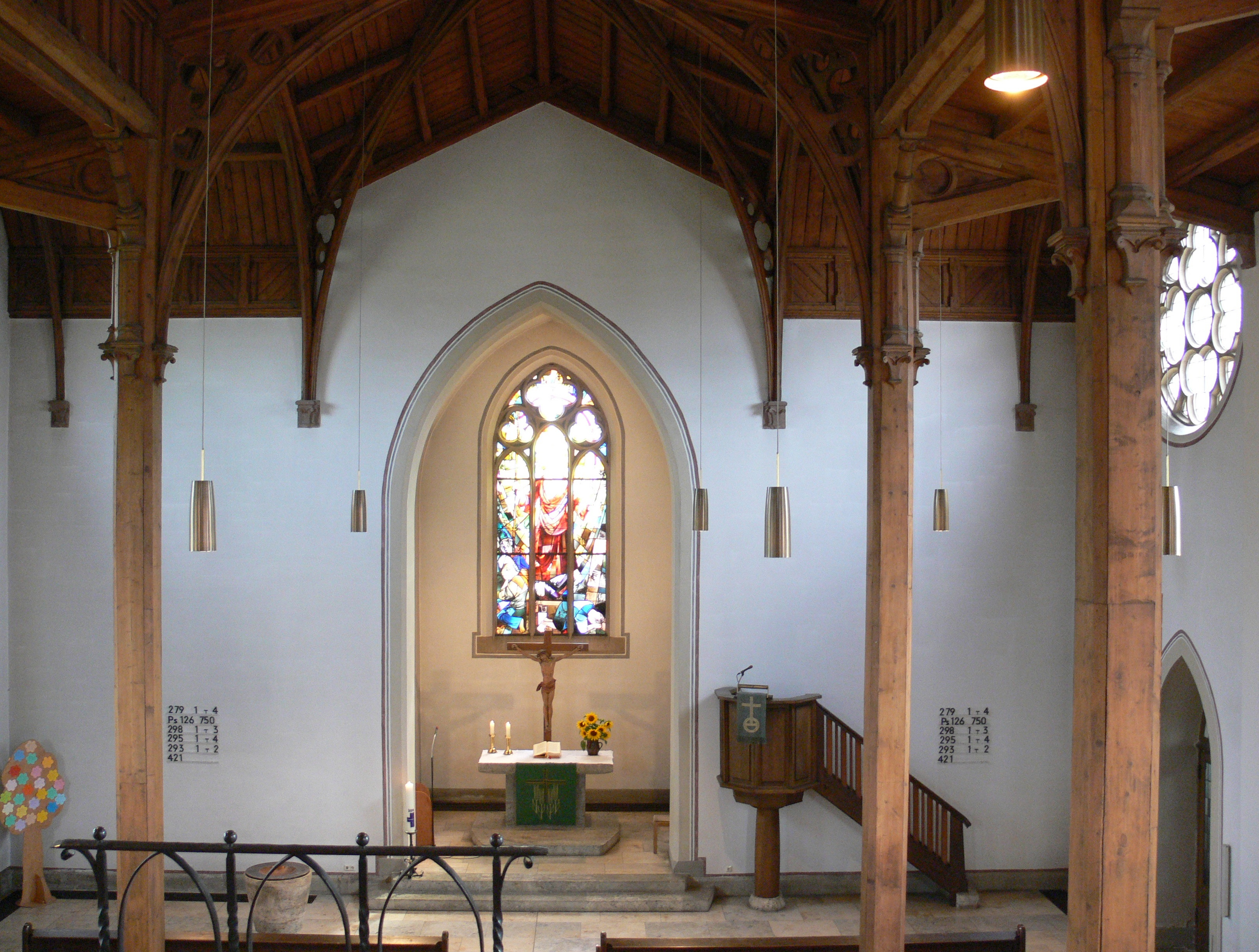 Weingarten (Württemberg), Evangelische Stadtkirche, Innenansicht